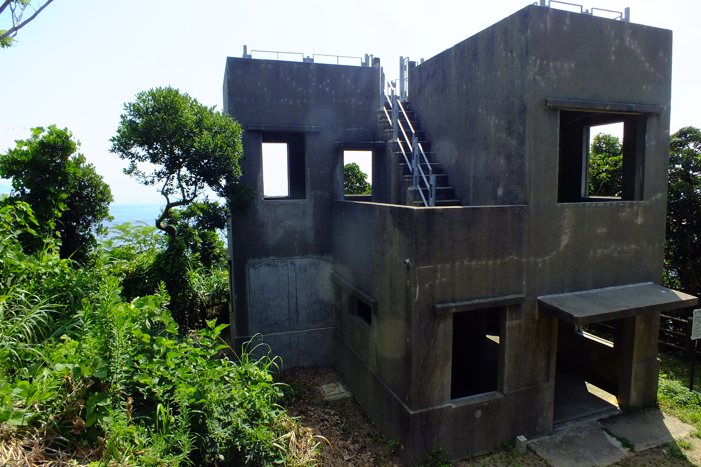 2016-08-05 Kami-shima Island, Kanteki-shô Ruins 神島監的哨跡 三島由紀夫『潮騒』舞台